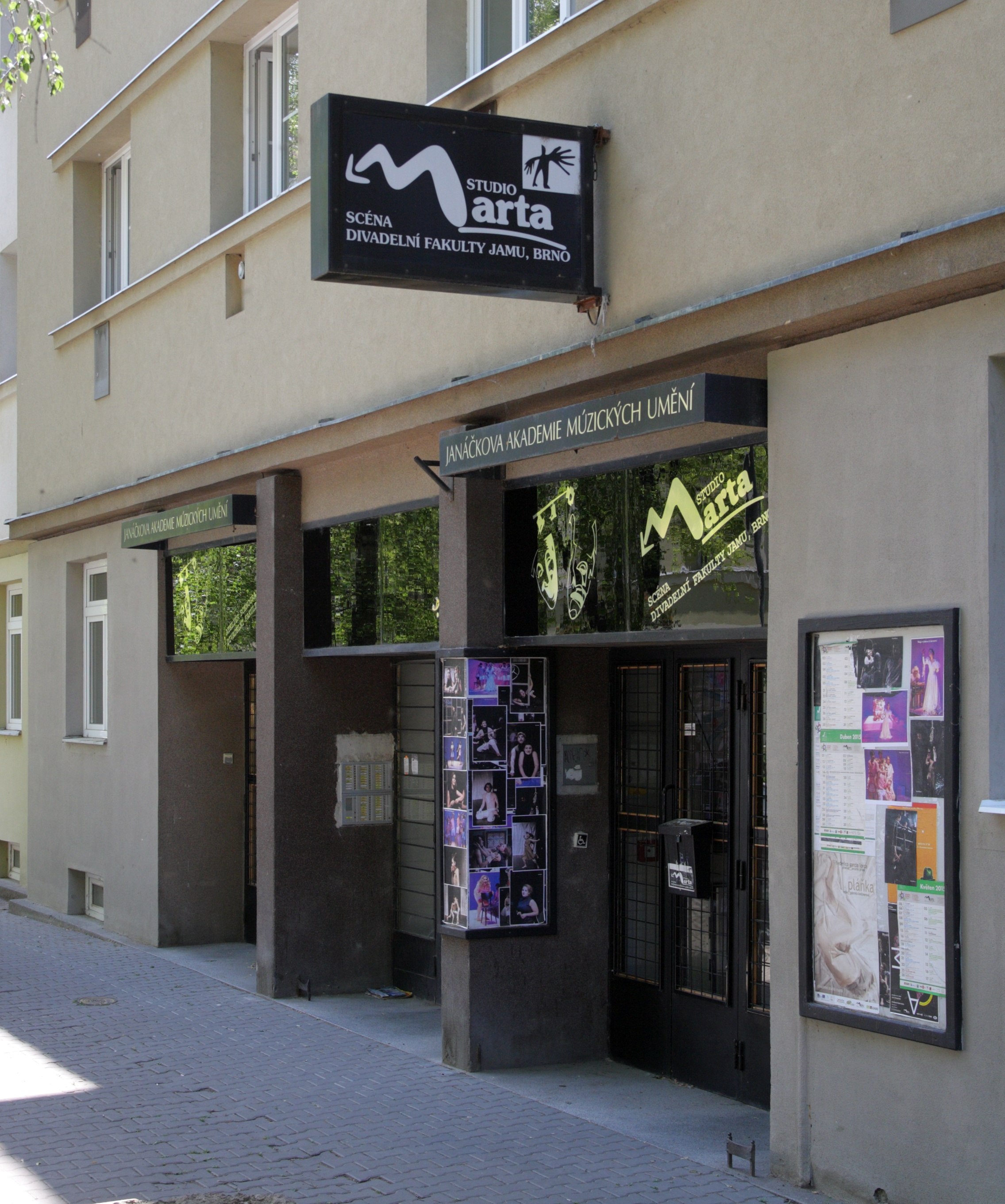 Brno, ul. Bayerova - Studio Marta.